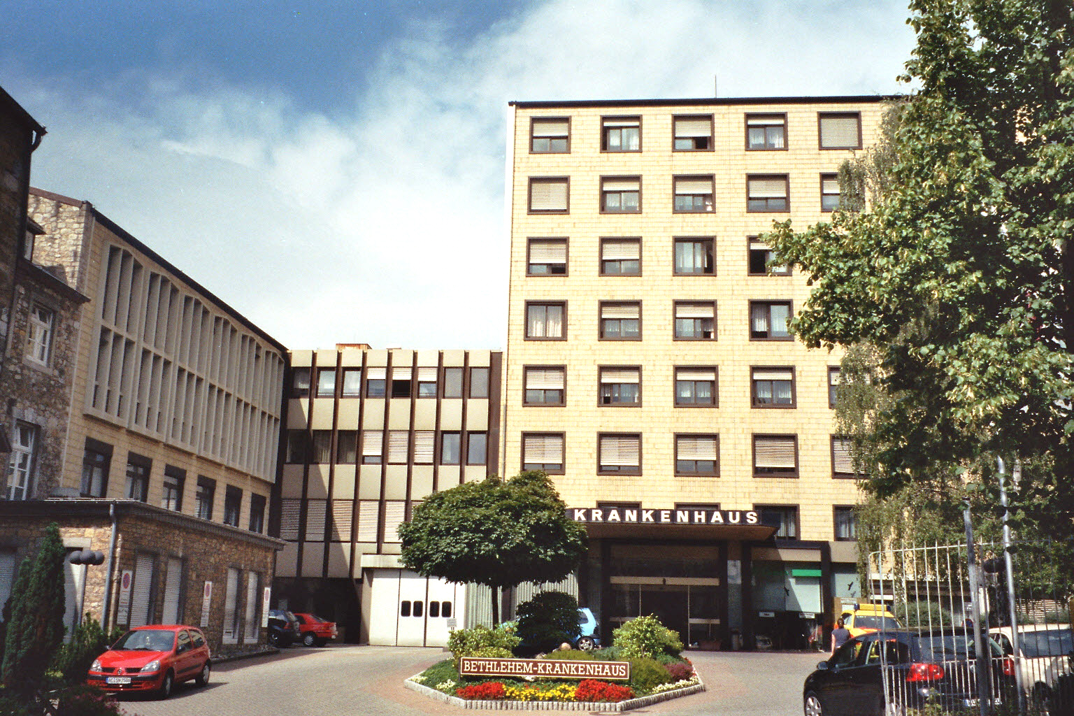 Bethlehem_Krankenhaus_in_Stolberg_(Rhld.)